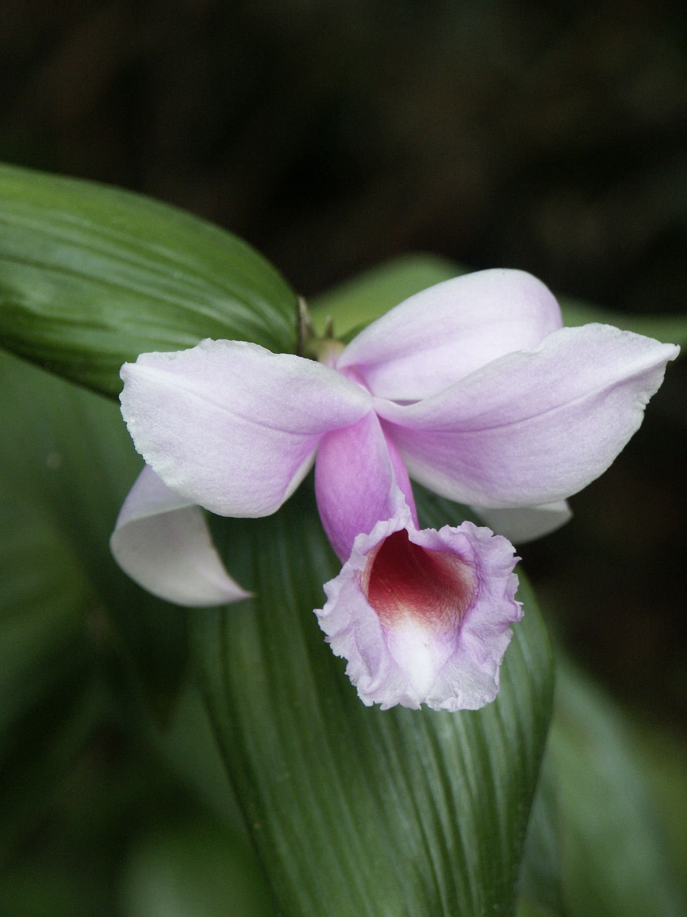 Sobralia decora; Fairchild Tropical Botanic Garden, Miami, FL, USA